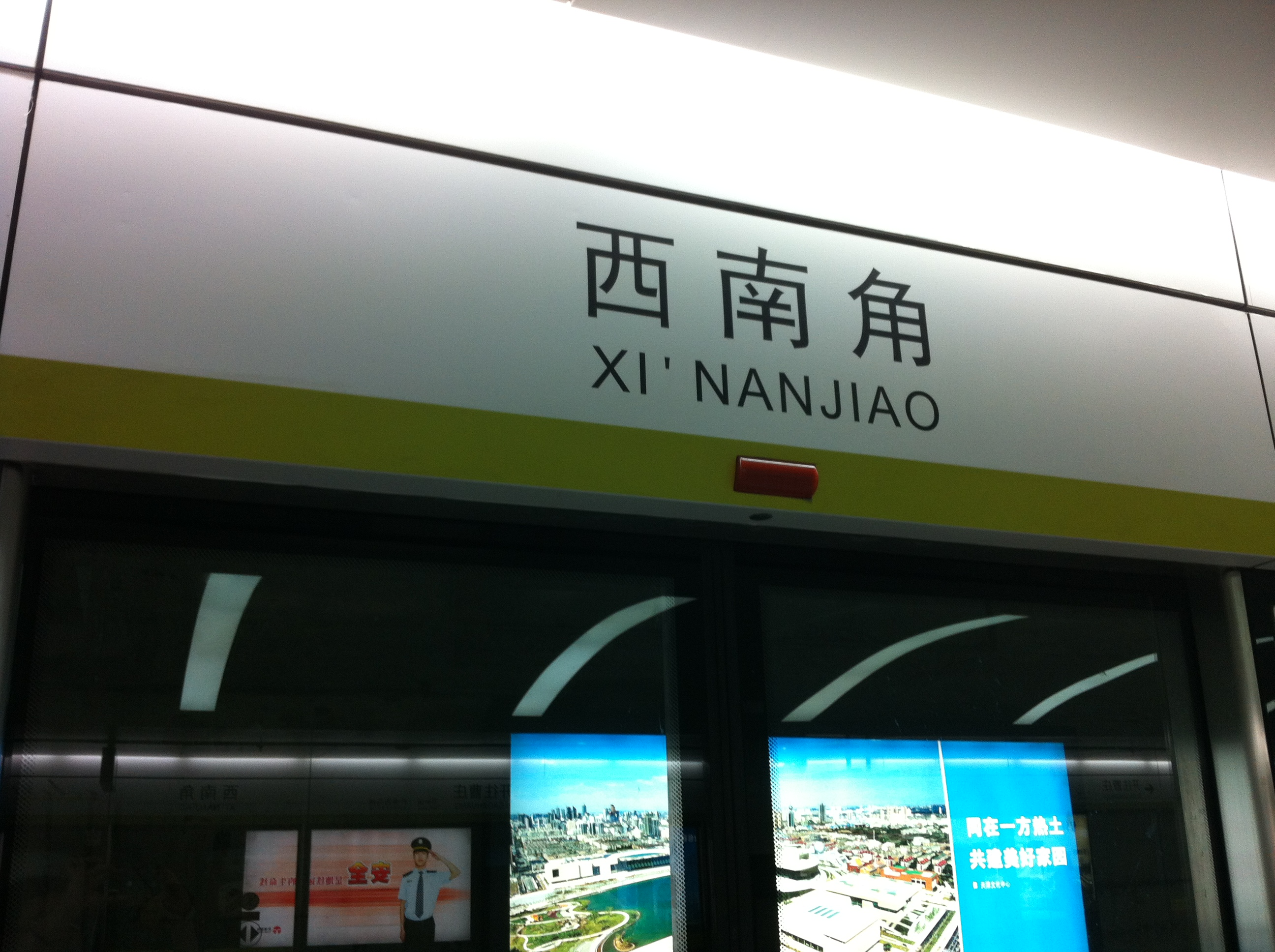 天津地铁二号线西南角站